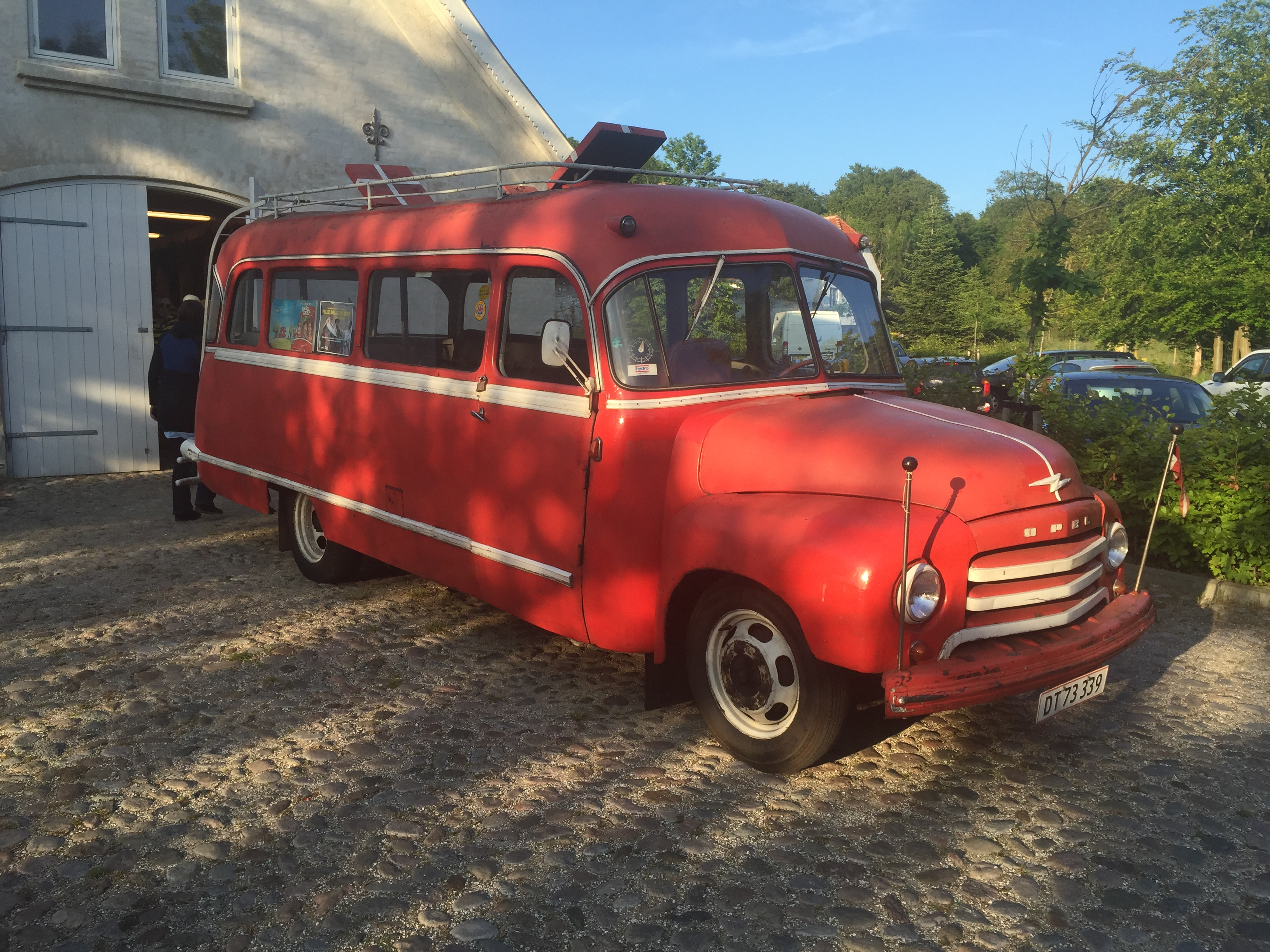 Opel bus, brugt i tv-serien Ude på noget